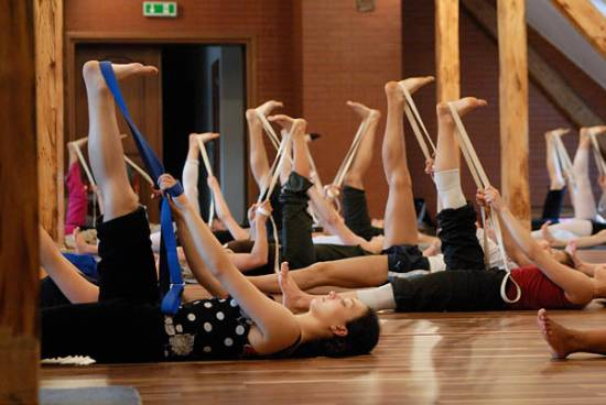 Międzynarodowa Szkoła Tańca w siedzibie Zespołu Pieśni i Tańca Śląsk